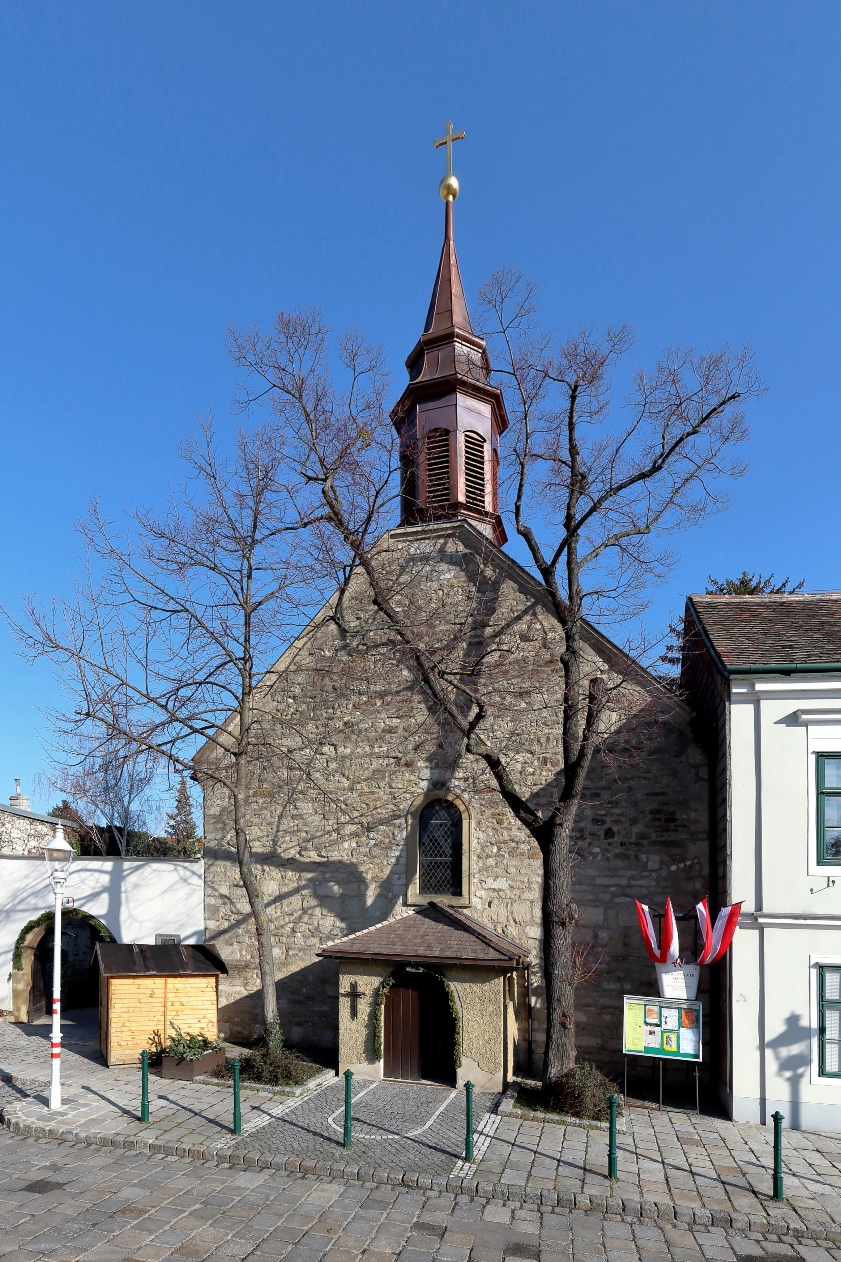 Südwestansicht der Heiligenstädter Kirche St. Jakob im 19. Wiener Gemeindebezirk Döbling.Die einschiffige Kirche ist eine der ältesten Wiens. Sie wurde über Resten eines römischen Gebäudes errichtet und ist teilweise noch in ihrer ursprünglich Form erhalten. Um 1100 erfolgte ein rechteckiger Choranbau (mit einem Achsknick nach links) und im 12. Jahrhundert erweiterte man das Langhaus Richtung Westen. Diese Form bildet den Kern der heutigen Jakobskirche, die 1256 bereits urkundlich erwähnt wurde. Die Außenmauern der Kirche (unverputzte Bruch- und Bachsteine) zeigen noch romanische Formen, jedoch das Innere wurde barockisiert.